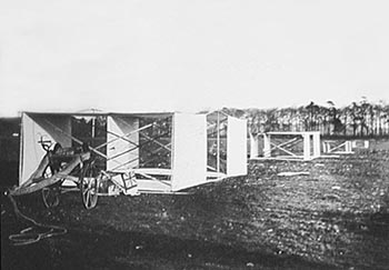 Kite train ("Reihenschaltung" mehrerer Kastendrachen) Versuche von Samule Franklin Cody Sonstiges: lizenzfrei